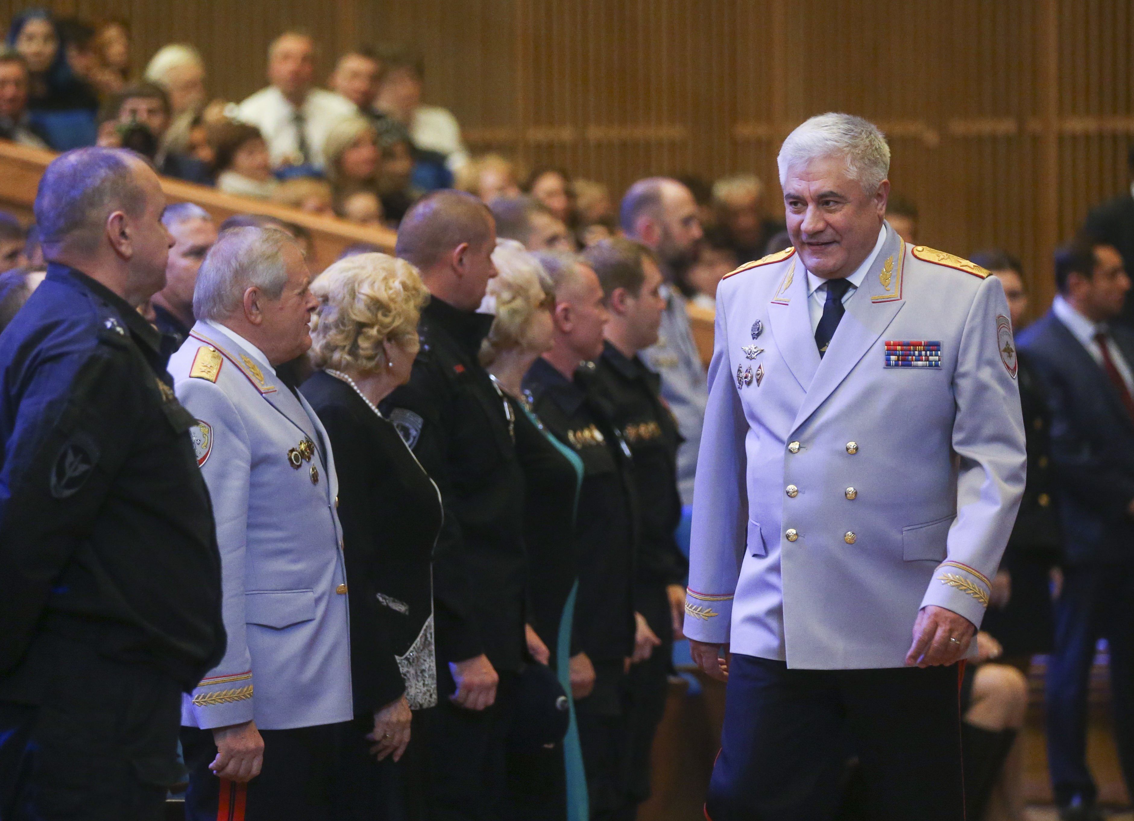 Министр внутренних дел РФ генерал полиции Владимир Колокольцев на праздничном концерте, посвященном Дню сотрудника органов внутренних дел 10 ноября 2018